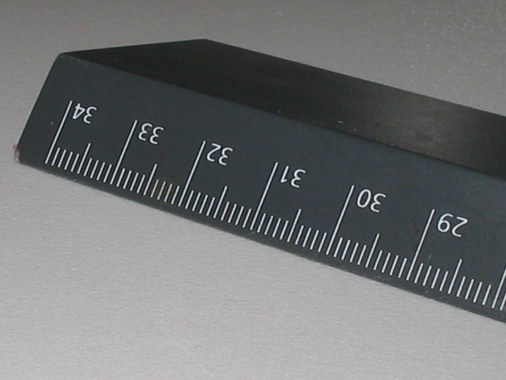 Een liniaal.